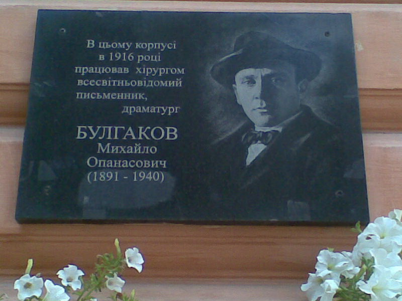 БулгаковЧернівці